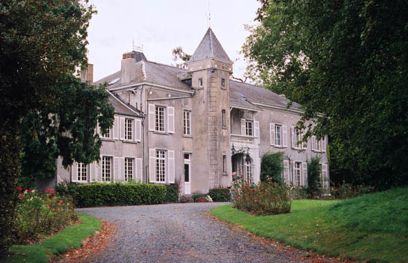 Nieuw Kasteel van Rukkelingen